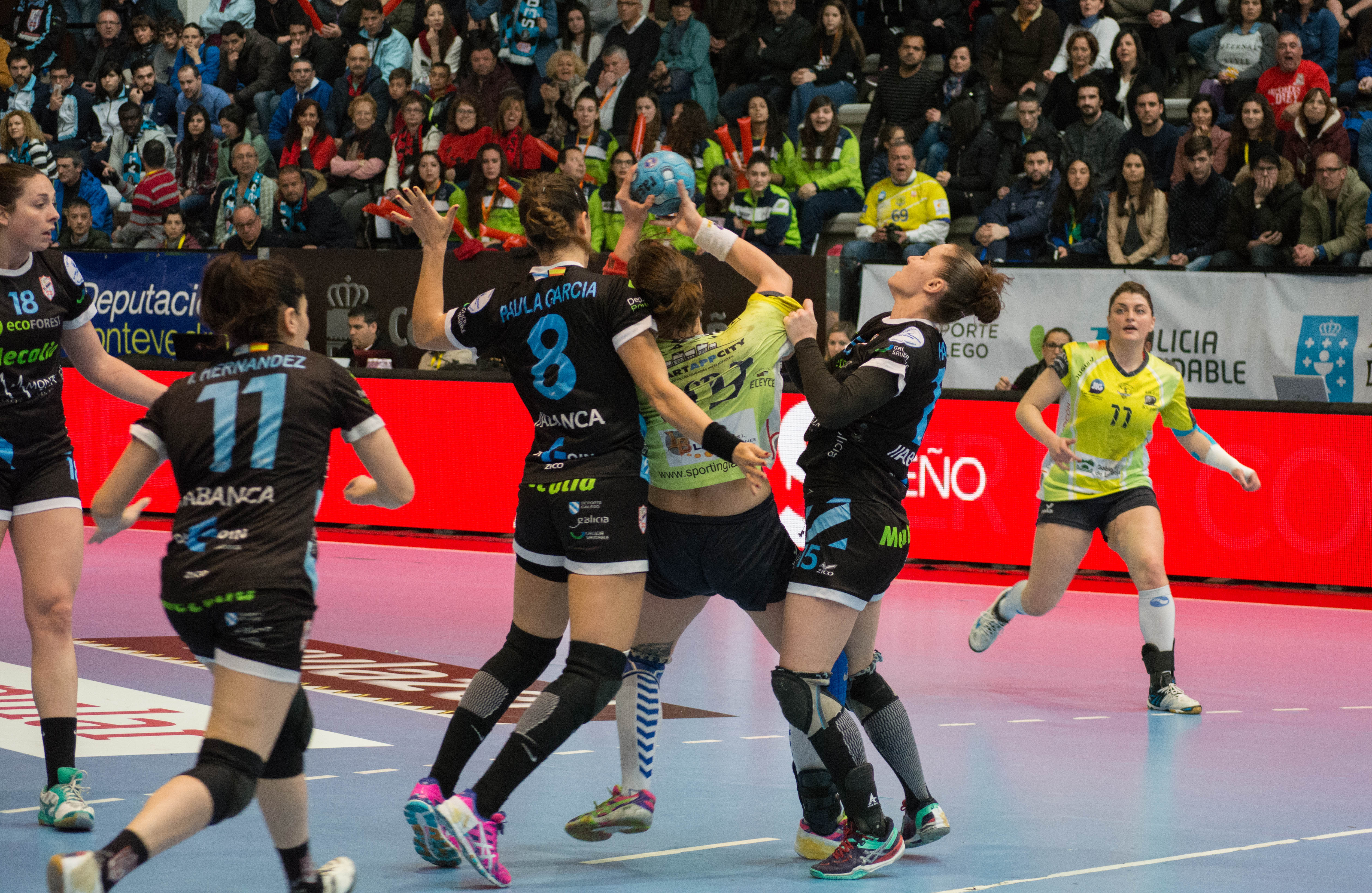 Partido correspondiente a la Copa de la Reina de Balonmano 2016 en O Porriño entre los equipos Sporting La Rioja y Guardés